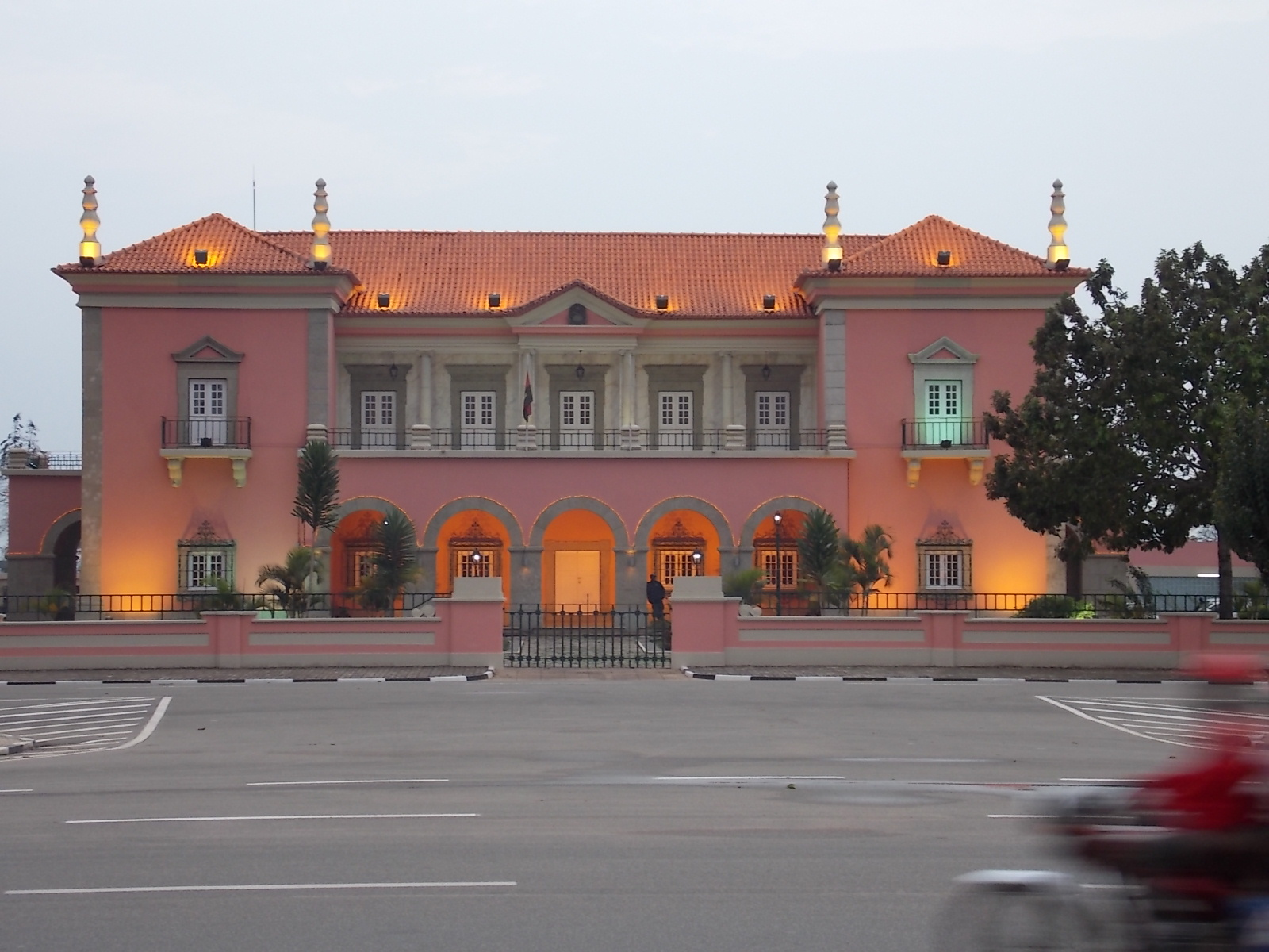 Palácio do Governador, Cidade Alta, Huambo, Angola